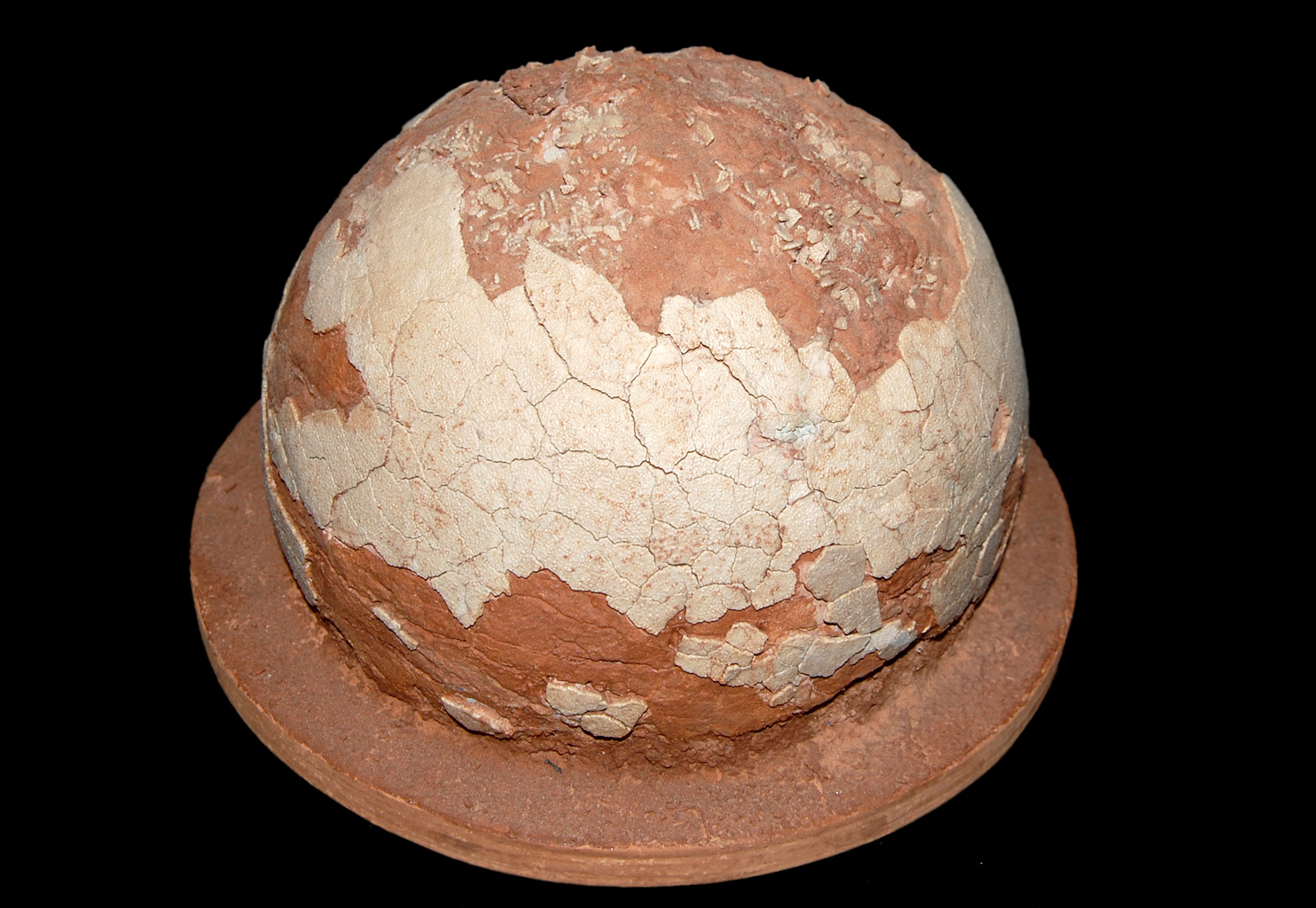 Naturhistorisches Museum Wien